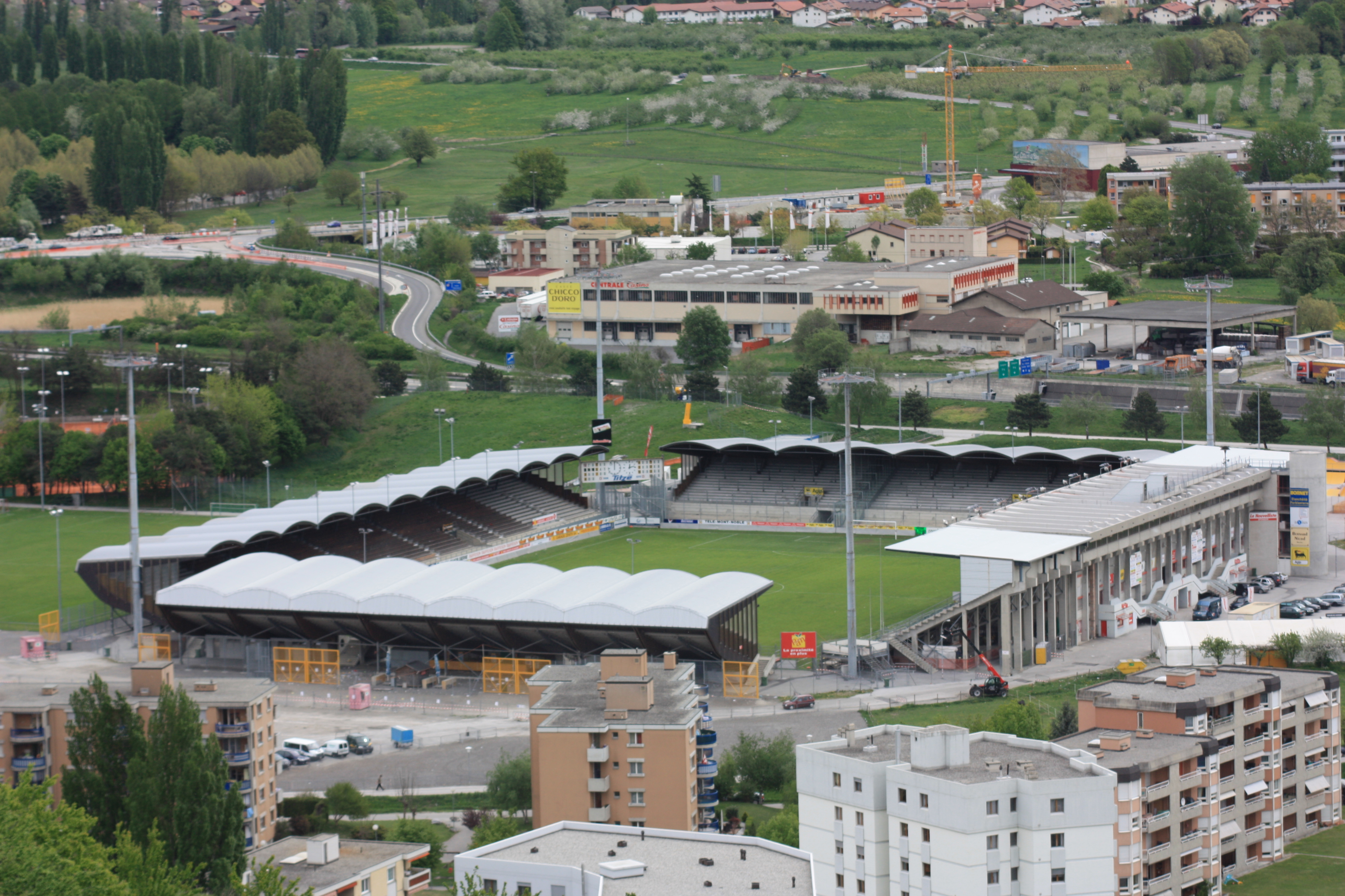 Prise de vue sur le stade de Tourbillon à Sion depuis Valère.